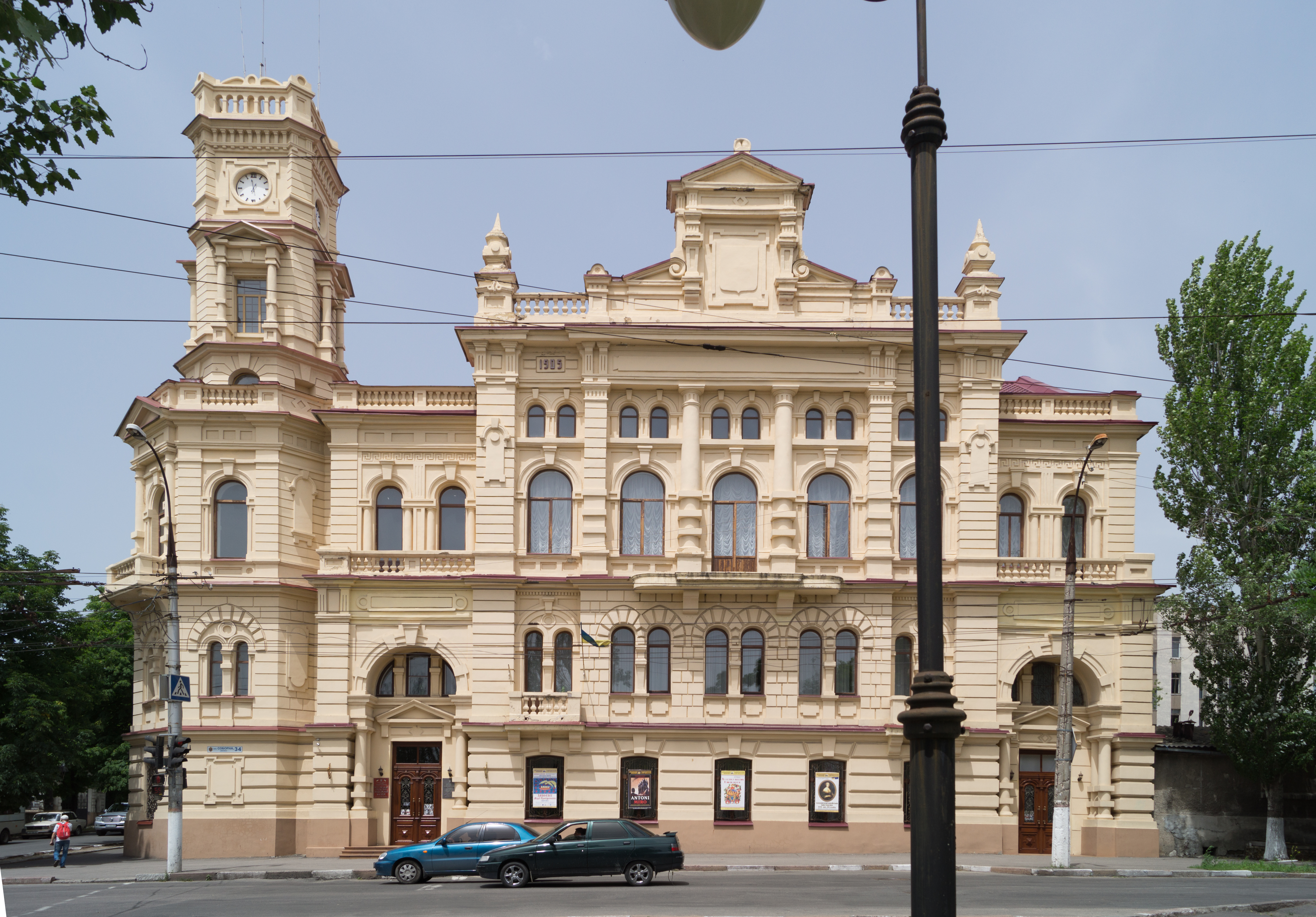 Будинок колишньої Херсонської міської думи (мур.), Херсон, вул. Соборна, 34